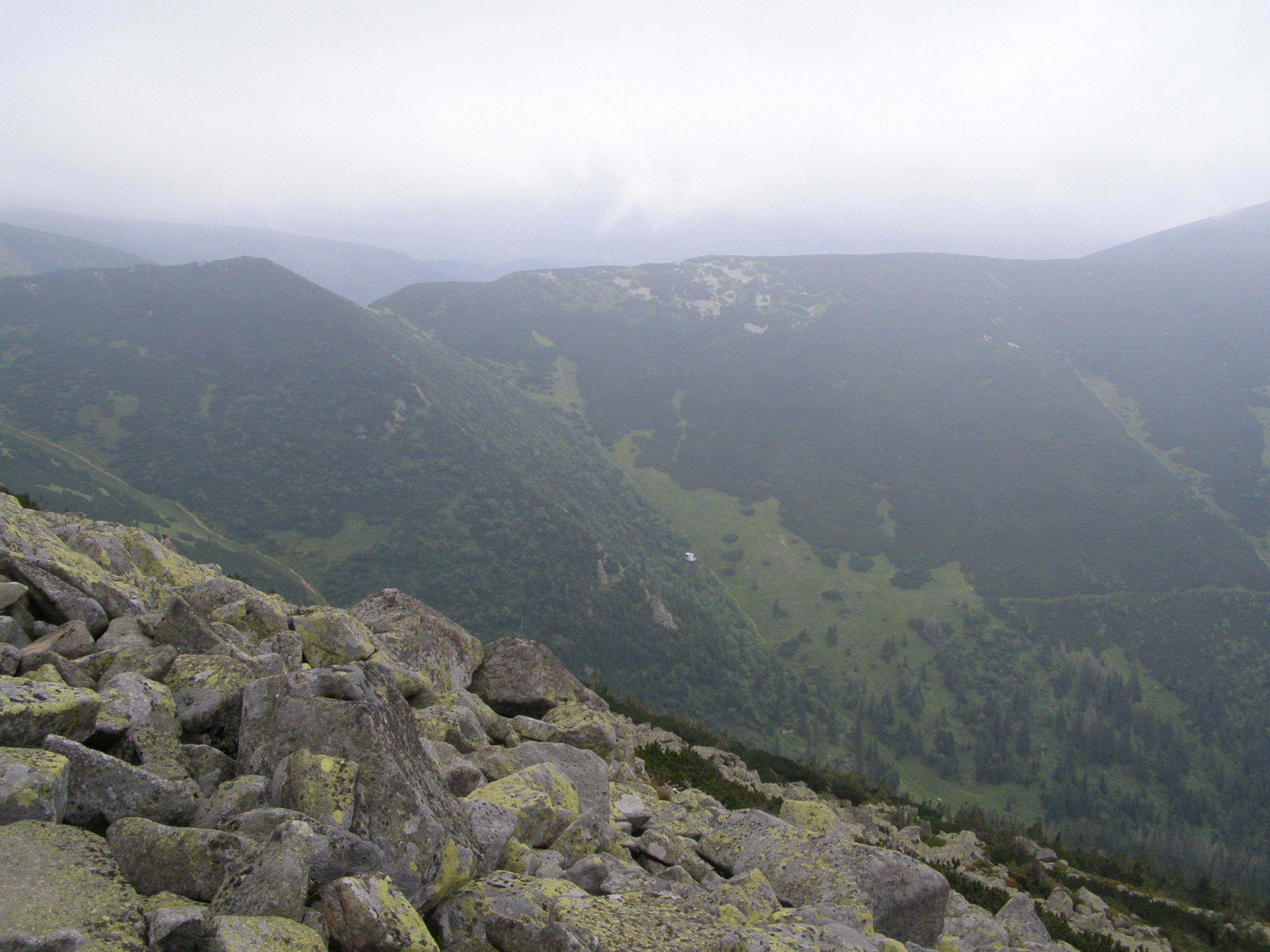 Nízké Tatry, Ďumbierské Tatry, pohled z jižního úbočí vrcholu Ďumbier (2043 m) na jih: svahy masivu Veľký Gápeľ (1777 m)